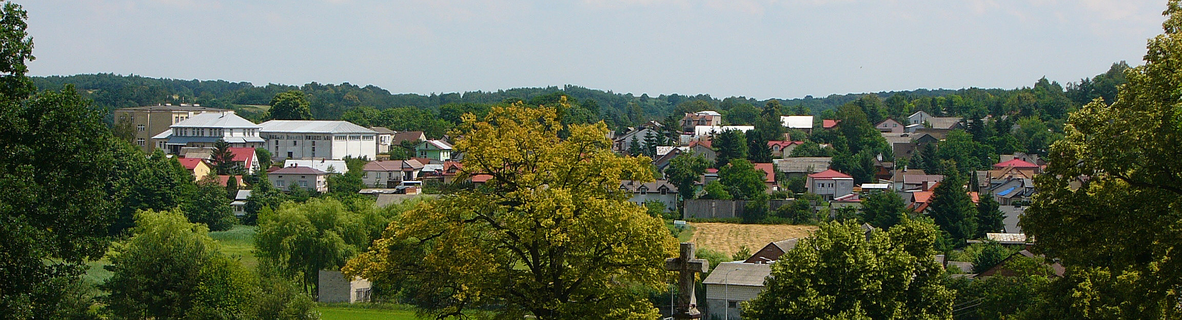 Wąwolnica, układ urbanistyczny i zabudowa osady obejmująca: ukształtowanie terenu układ urbanistyczny z zabudową mieszkalną i zagrodową kościół pw. św. Wojciecha BM, kaplicę pw. NMP wraz z wyposażeniem wnętrza, otaczającym drzewostanem i wzgórzem, na którym wzniesiony jest kościół i kaplica, plebanię cmentarz